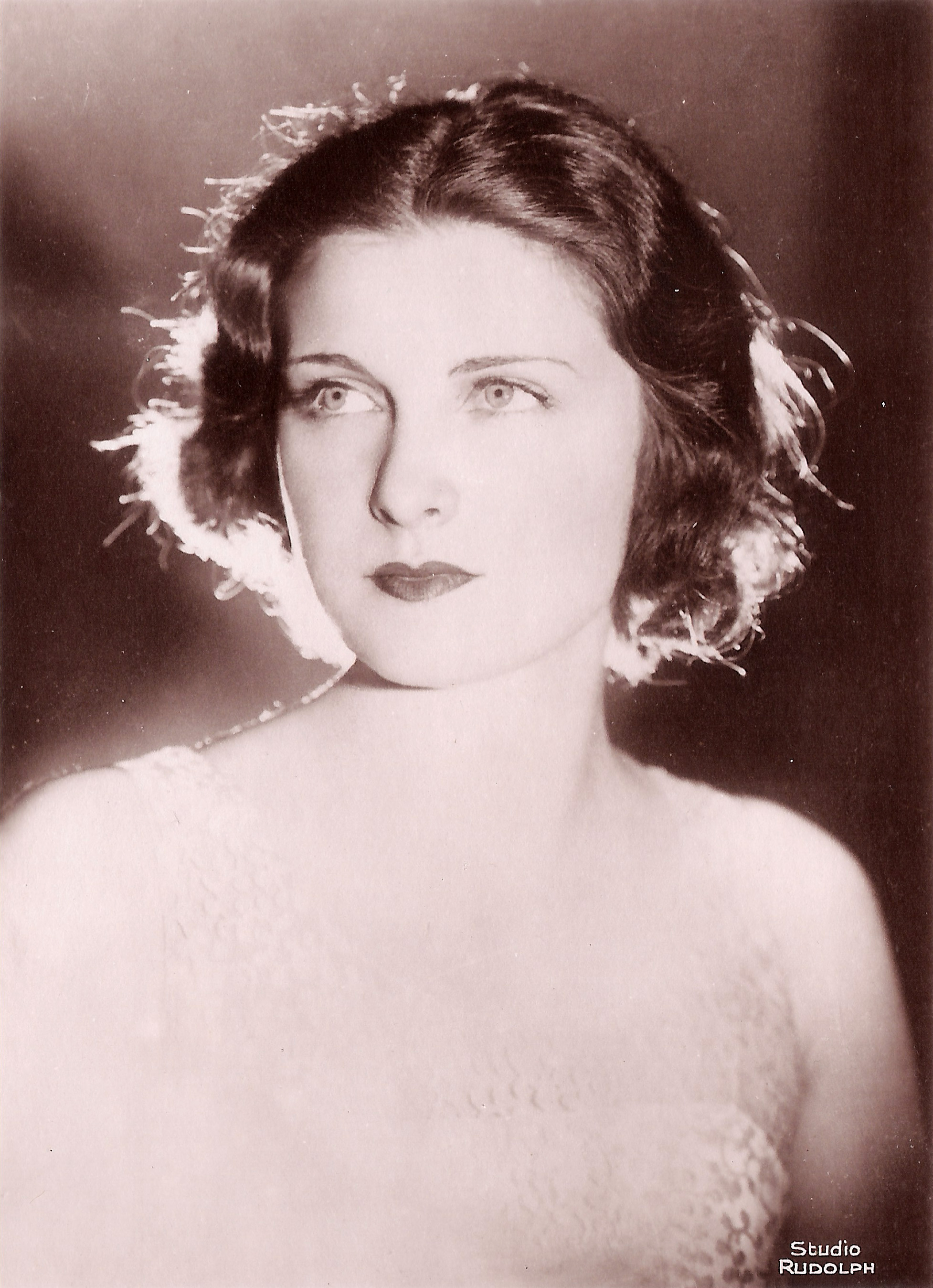 Simone Genevois. Carte postale d'époque (Cinémagazine), vers 1930.